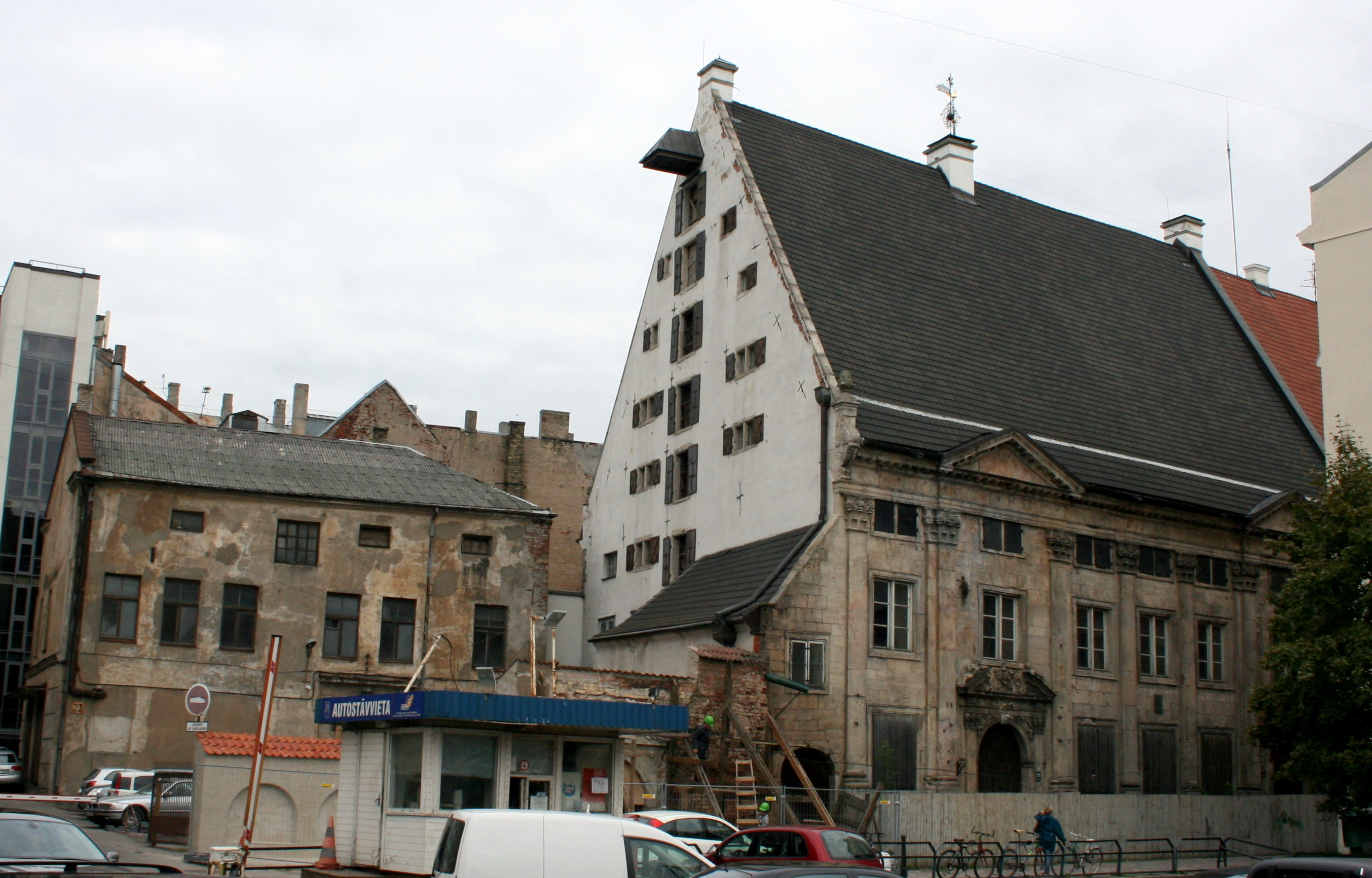 Das Dannensternhaus in Riga, im September 2010 fanden Restaurierungsarbeiten im Eingangsbereich statt.